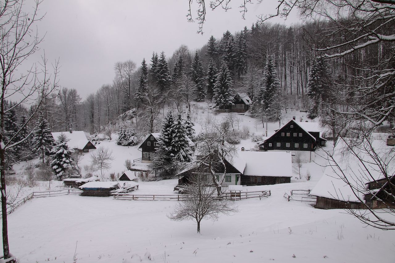 pohled na stejnou část obce (2016)